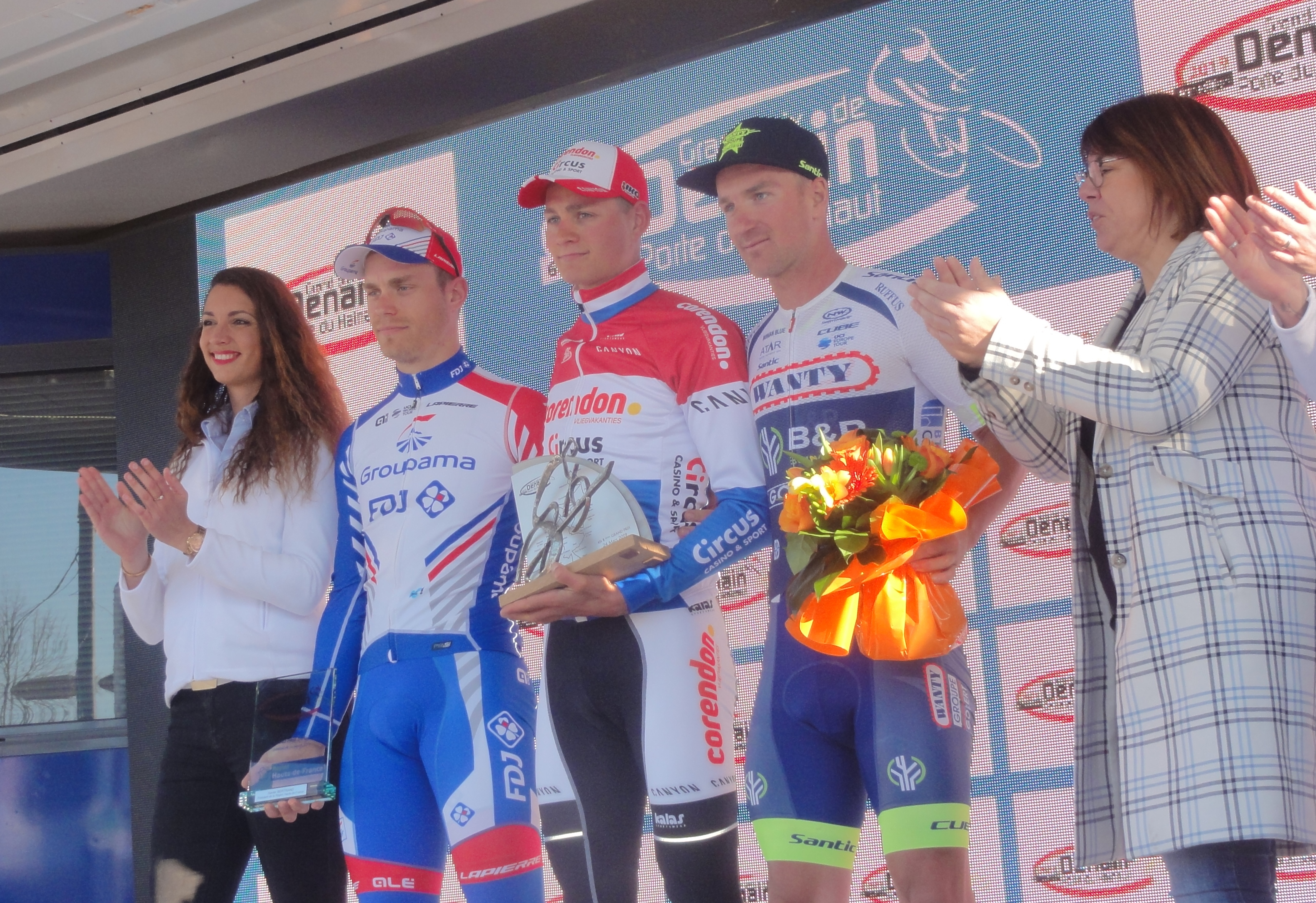 Reportage réalisé le dimanche 24 mars à l'occasion du départ et de l'arrivée du Grand Prix de Denain 2019 à Denain, Nord, Nord-Pas-de-Calais-Picardie, France.